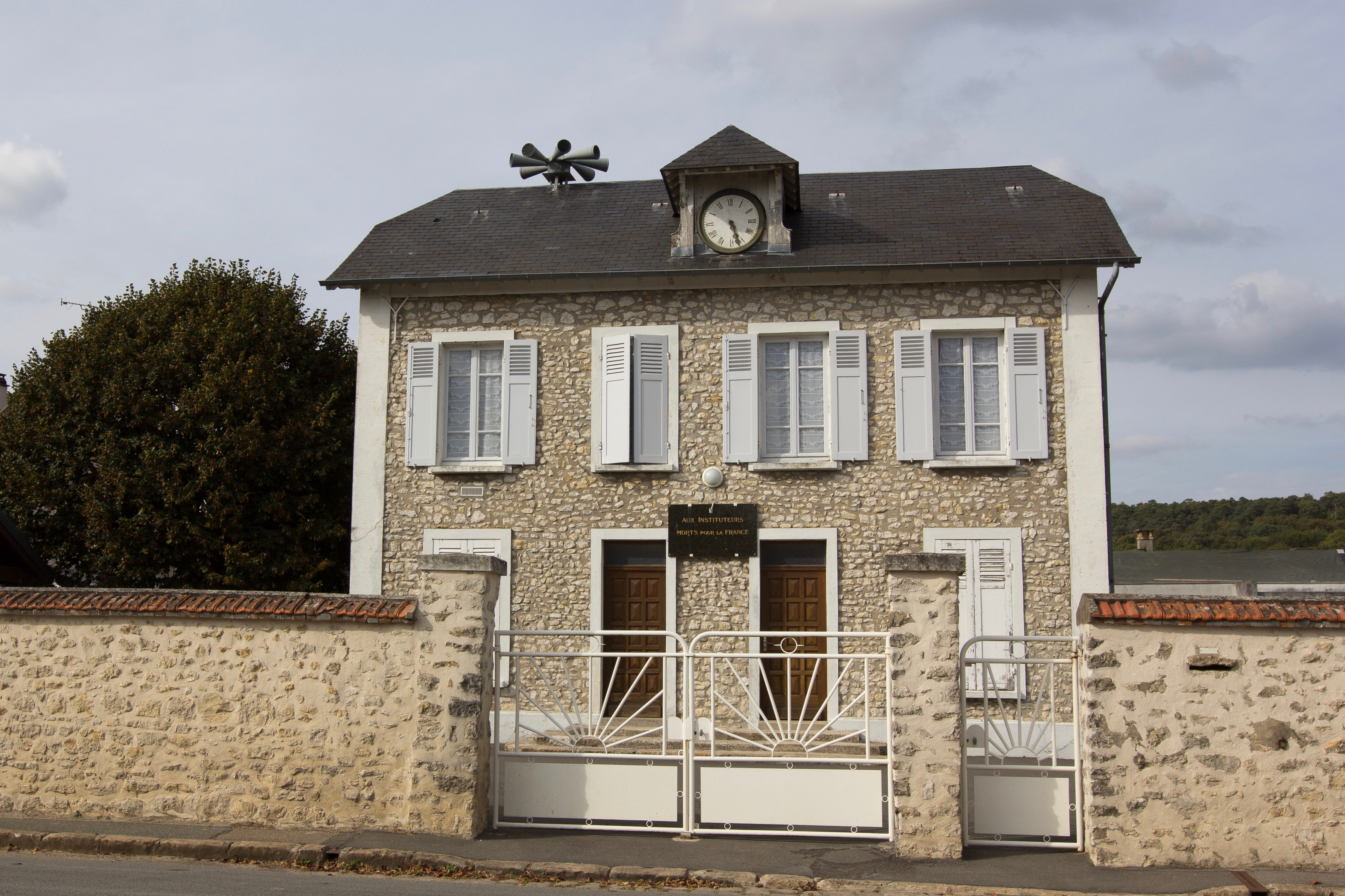 Ecole de Bouville (ancienne mairie) / Bouville / Essonne / France